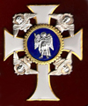 Орден Святого Архістратига Михаїла «За заслуги з відродження духовності в Україні»